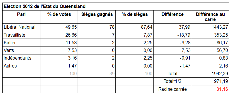 Tableau des indices de Gallagher des Élections 2012 de l'État de Queensland